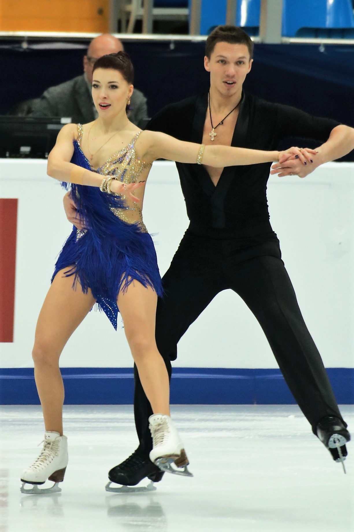 Екатерина Боброва / Дмитрий Соловьёв (Россия) на Чемпионате Европы по фигурному катанию 2018.